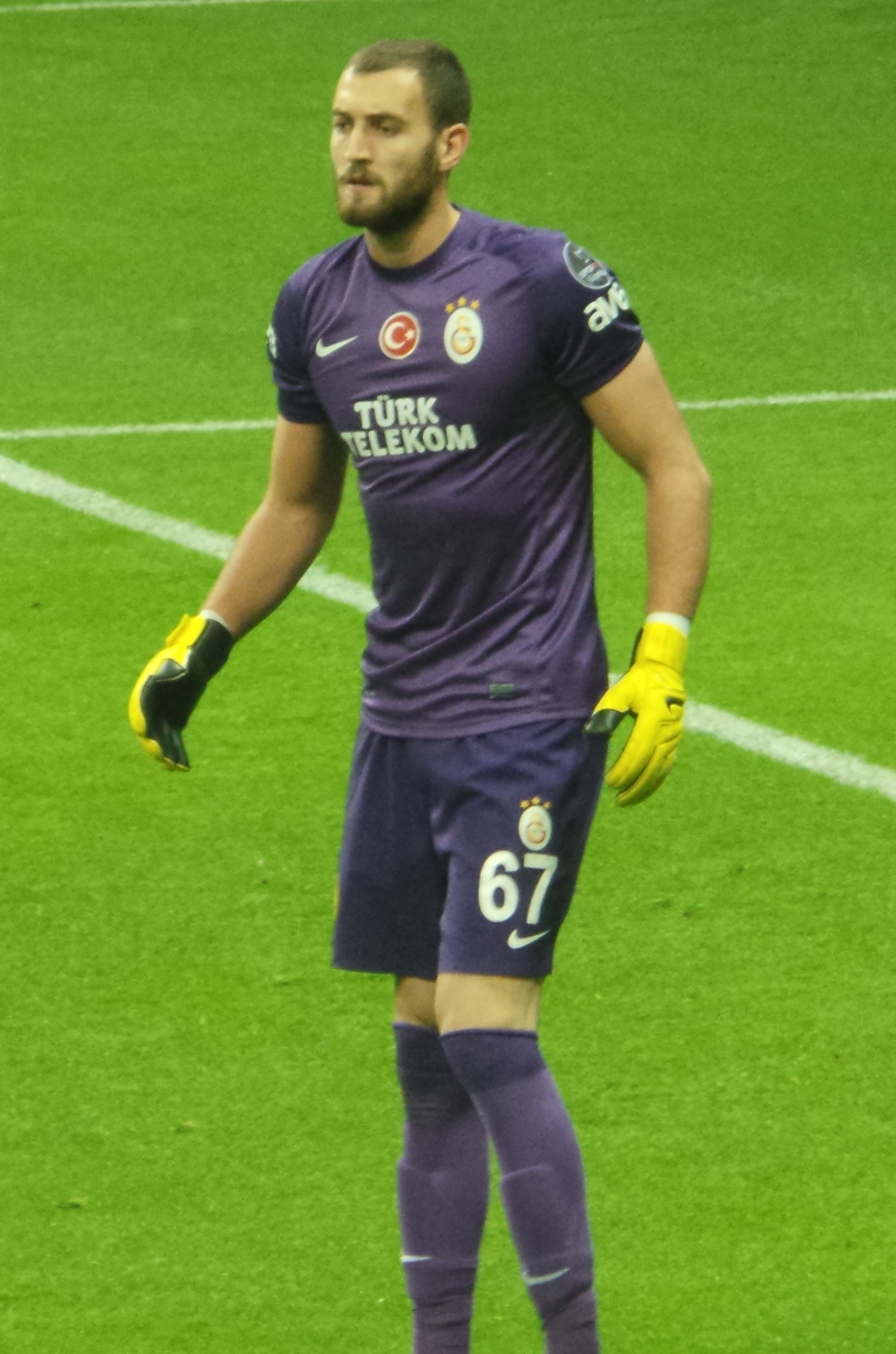 Eray İşcan '13-14